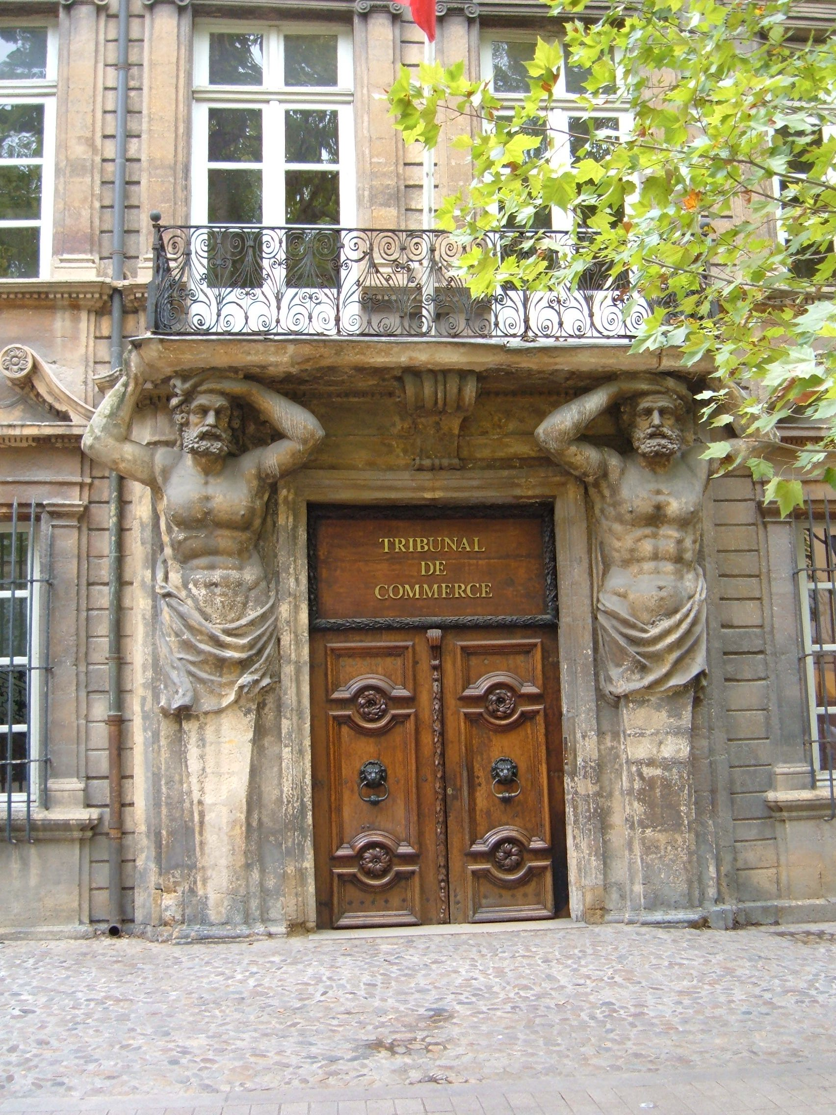 The Hôtel Maurel de Pontevès at 38 Cours Mirabeau in Aix-en-Provence, France.